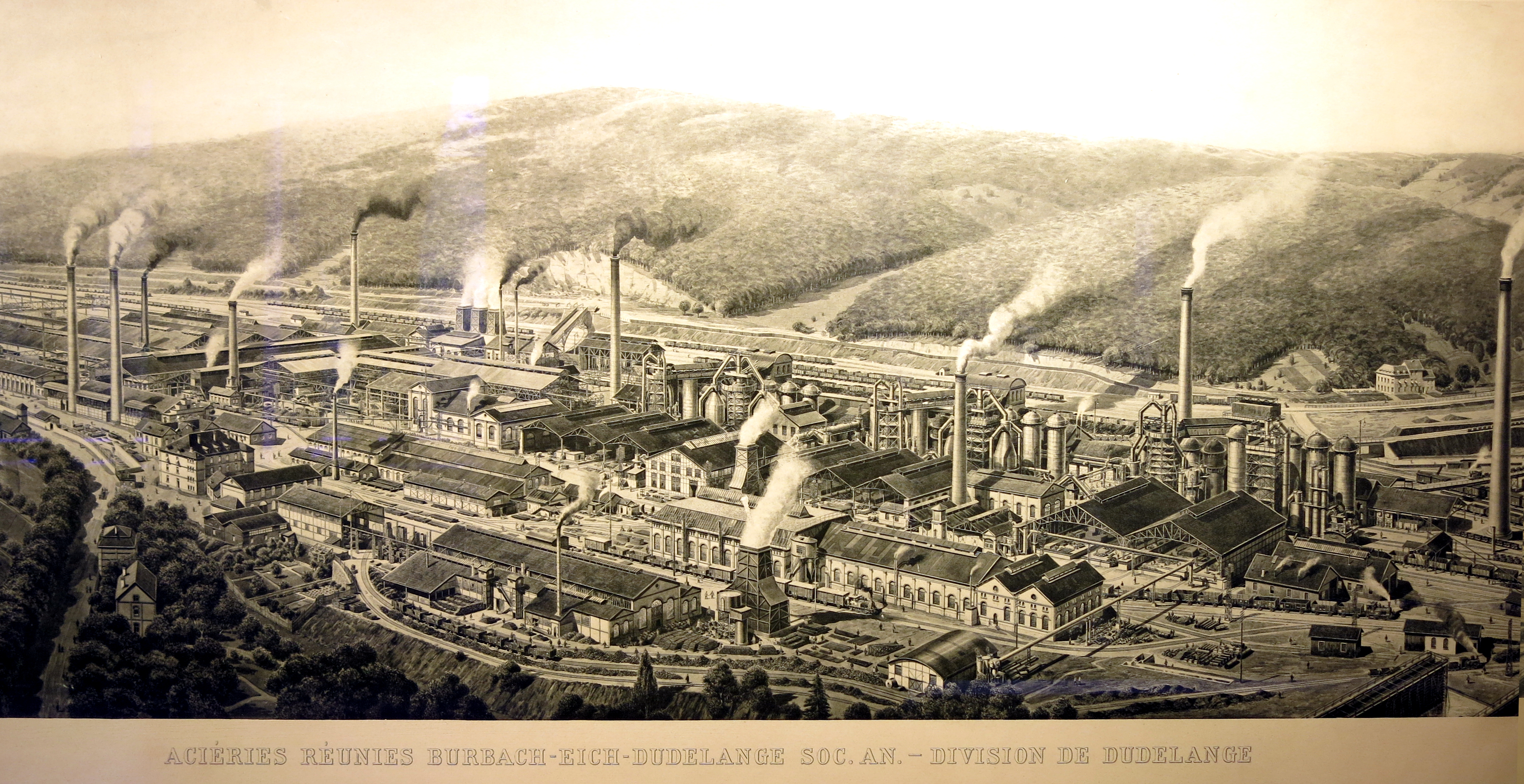 D'Diddelenger Schmelz ëm 1912.